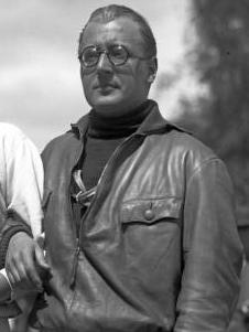 Die große internationalen Motorbootrennen auf dem Templiner-See b/Potsdam, fanden unter Anwesenheit von deutschen, englischen, amerikanischen und französischen Rennbooten statt. Zwei der populärsten Teilnehmer am internationen Mortbootrennen , Miss Hentschel, Amerika (links) und Fritz von Opel.